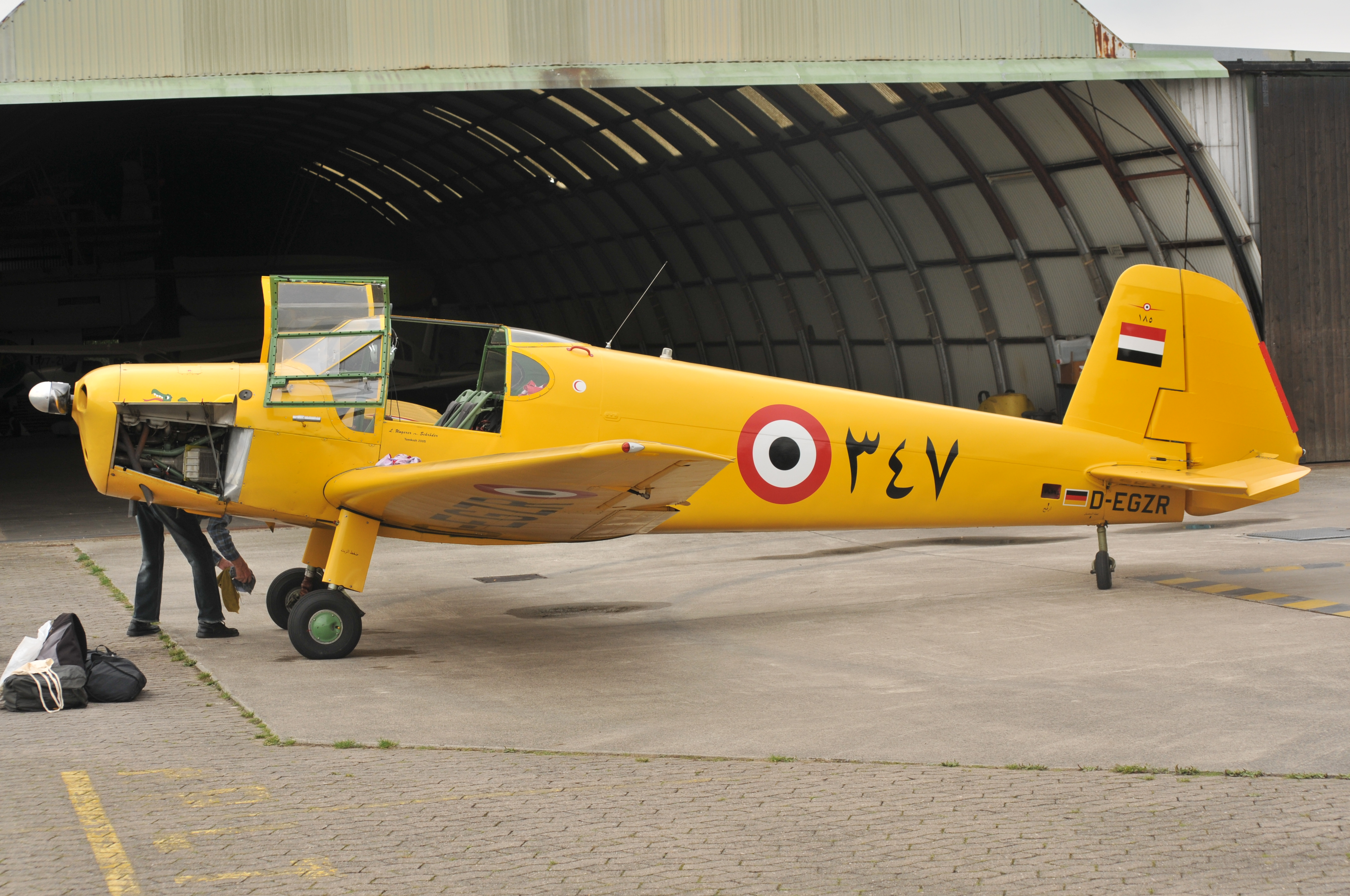 Fotoflug Nordsee